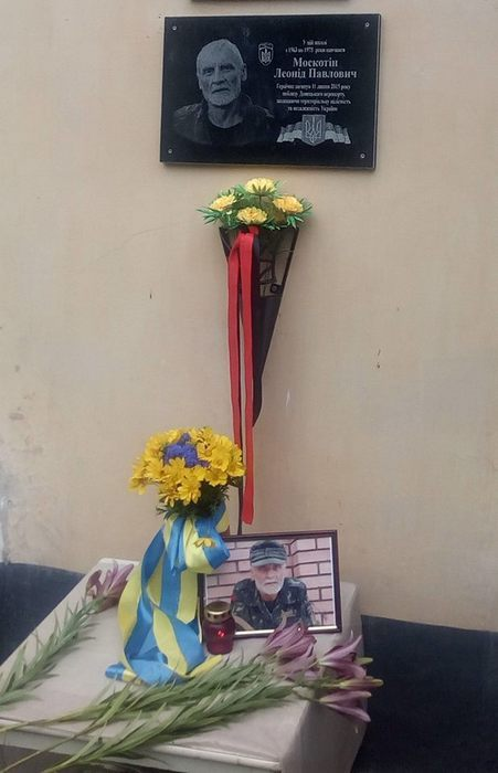 меморіальна дошка